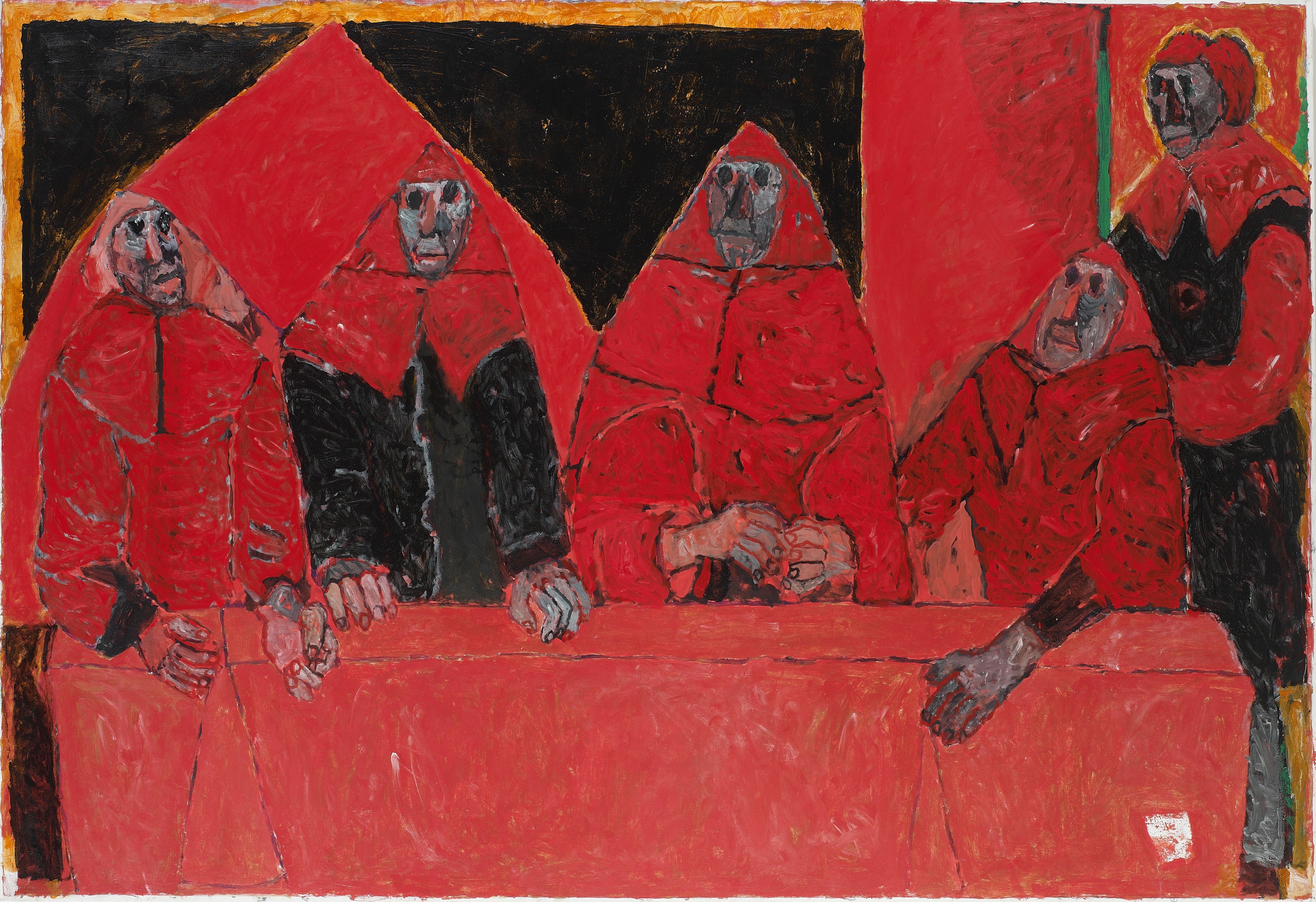 Oeuvre du peintre François Dilasser (1926-2012)